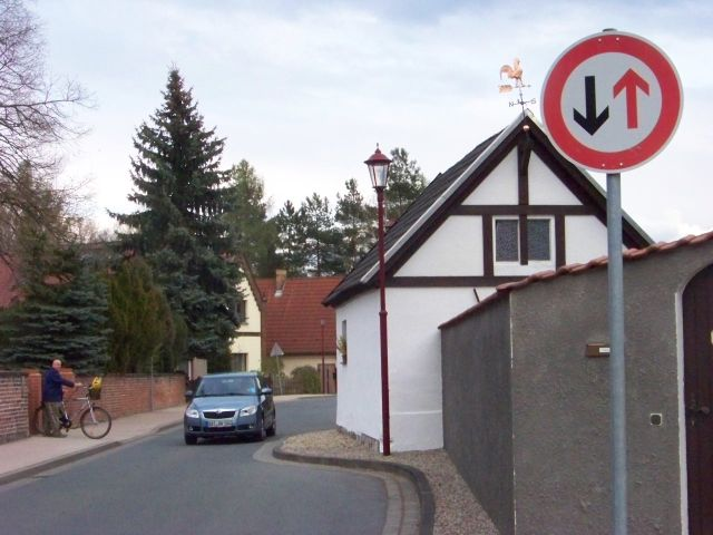 Straßenverengung in Burgkemnitz